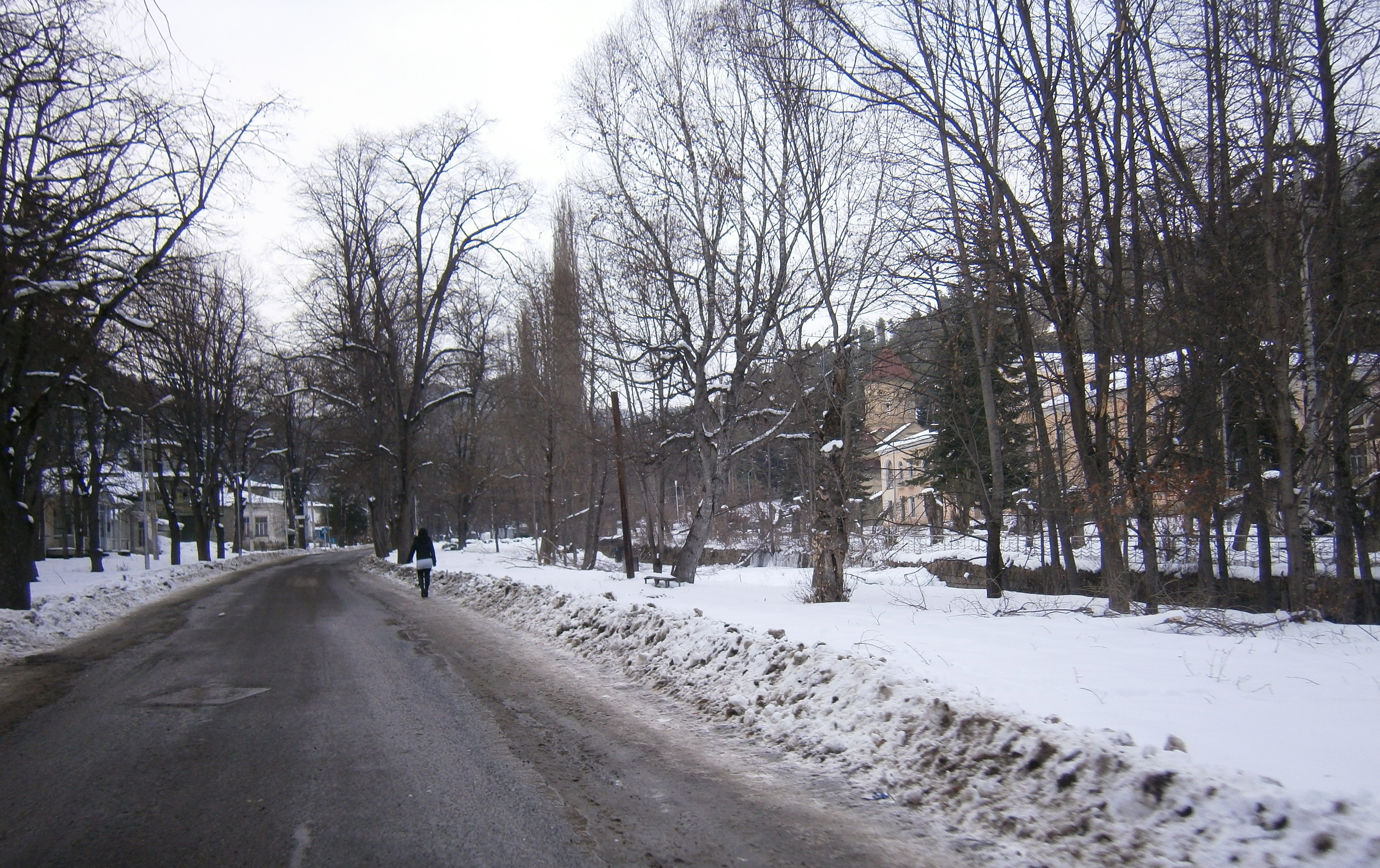 აბასთუმანი ზამთარში